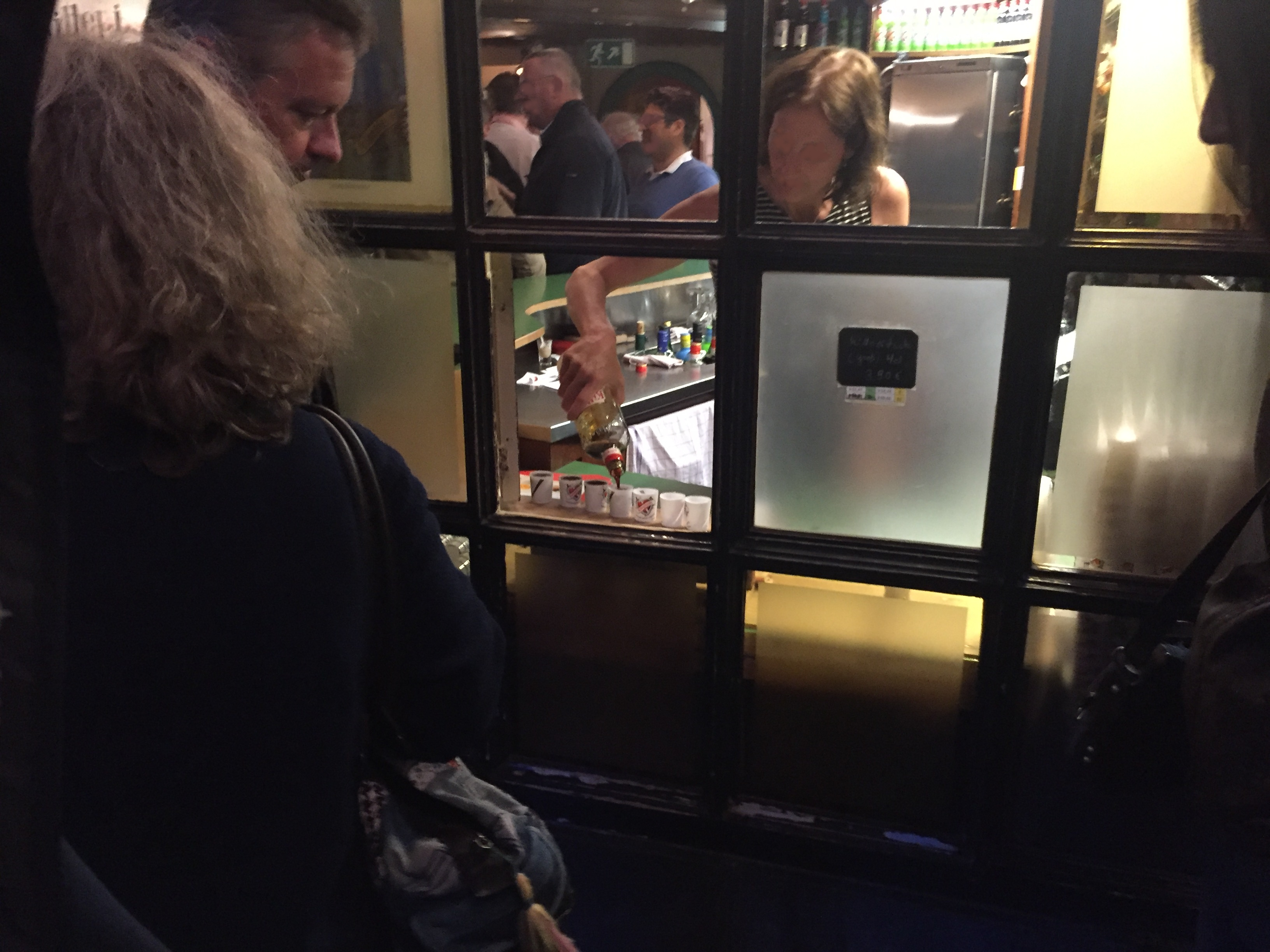 Düsseldorf - Et Kabüffke - Killepitsch